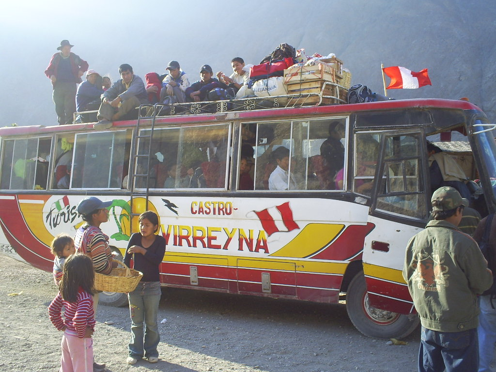 Bus rumbo hacia Aurahua, Villa de Arma